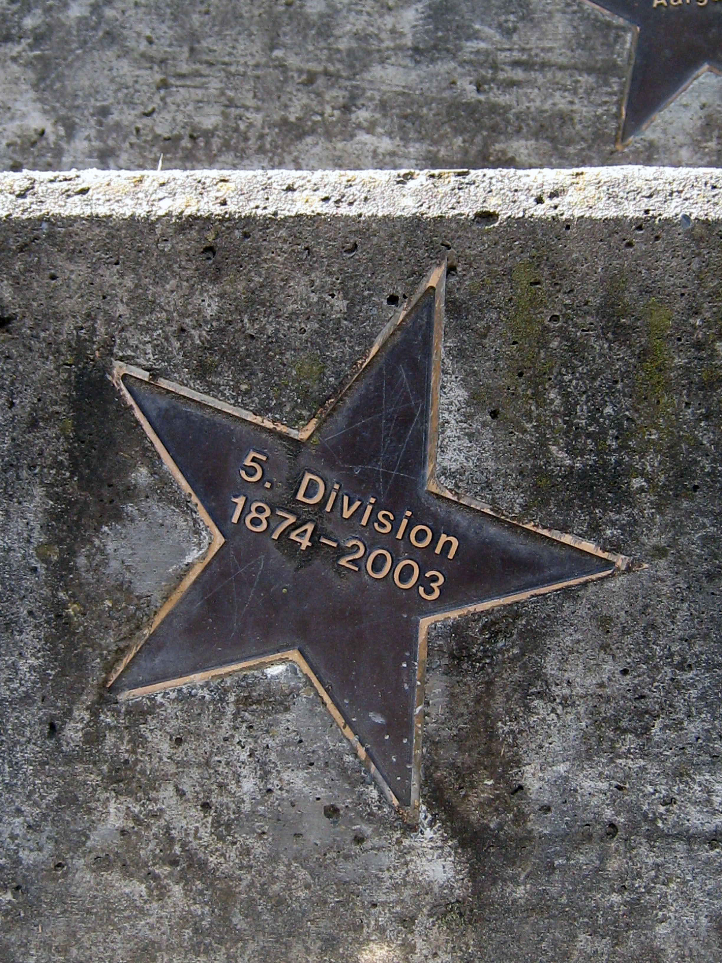 Limmatspitz, Steg erbaut von der Felddivision 5